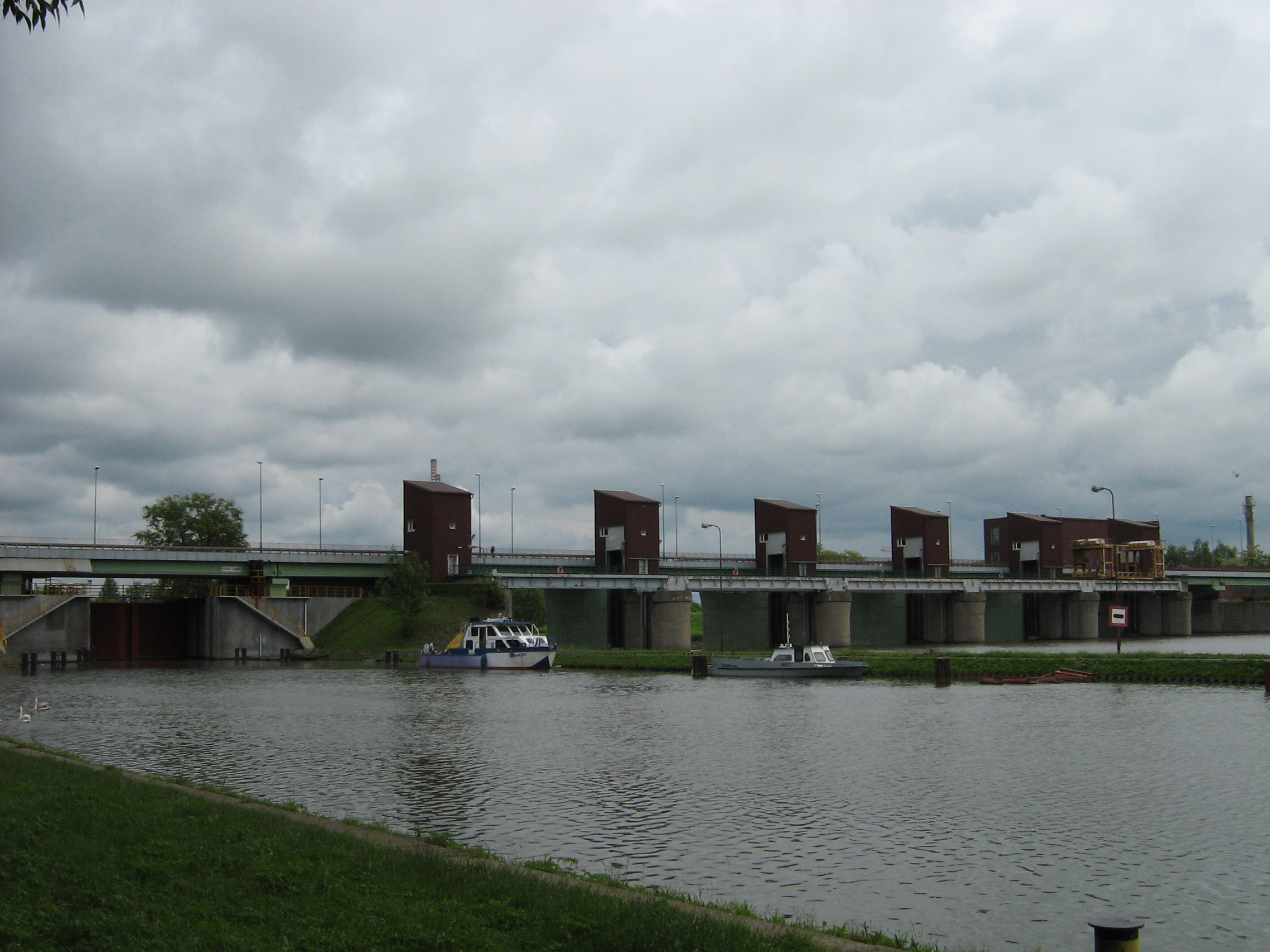 Kraków - Stopień Wodny Dąbie